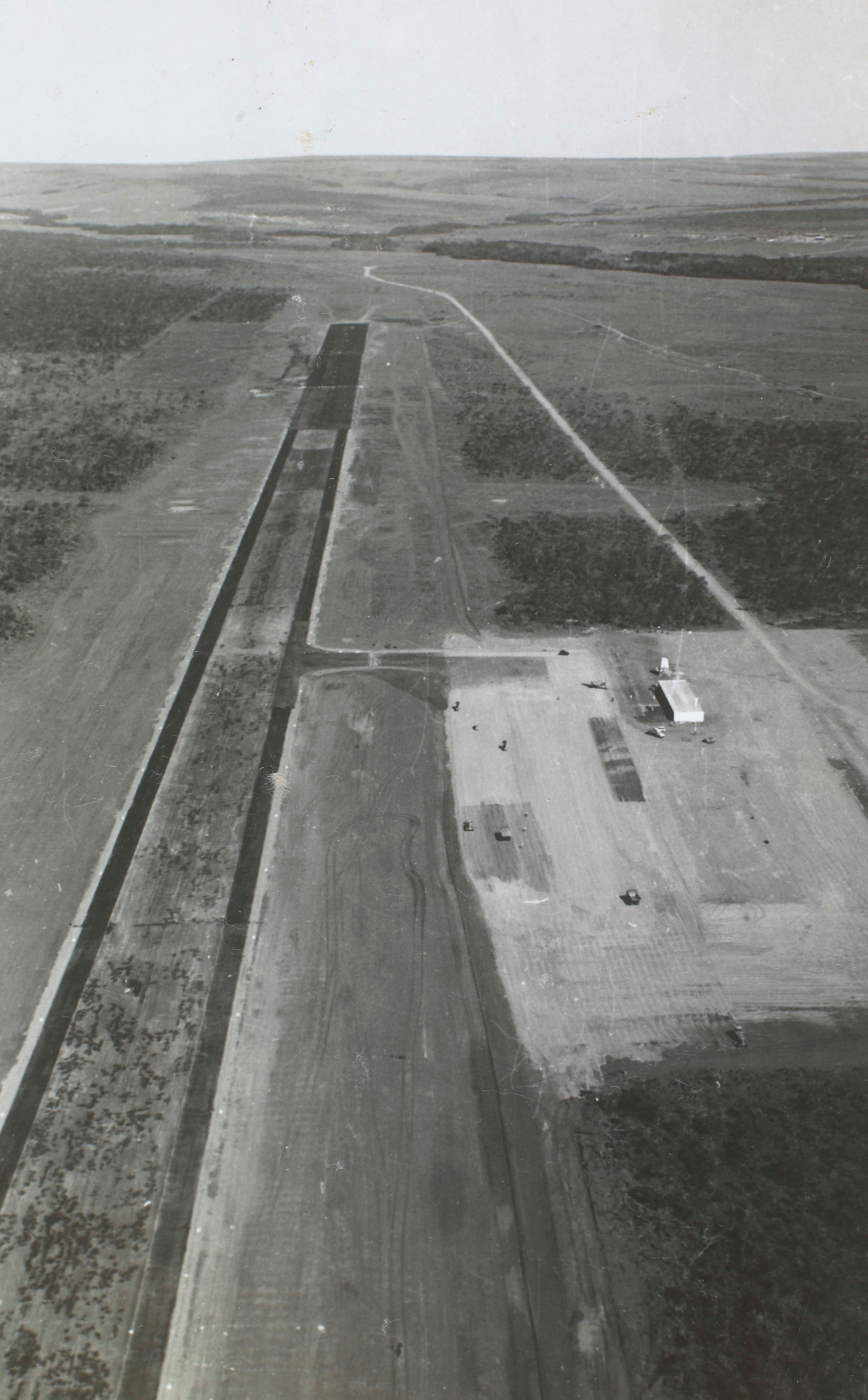 Fotografia do Fundo Correio da Manhã, sob a guarda do Arquivo Nacional.